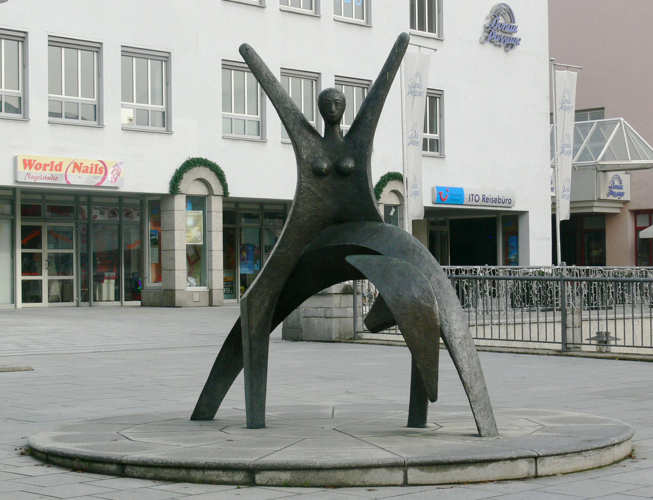 Passau, Bahnhofstraße (Europaplatz), Skulptur von Renate König-Schalinski